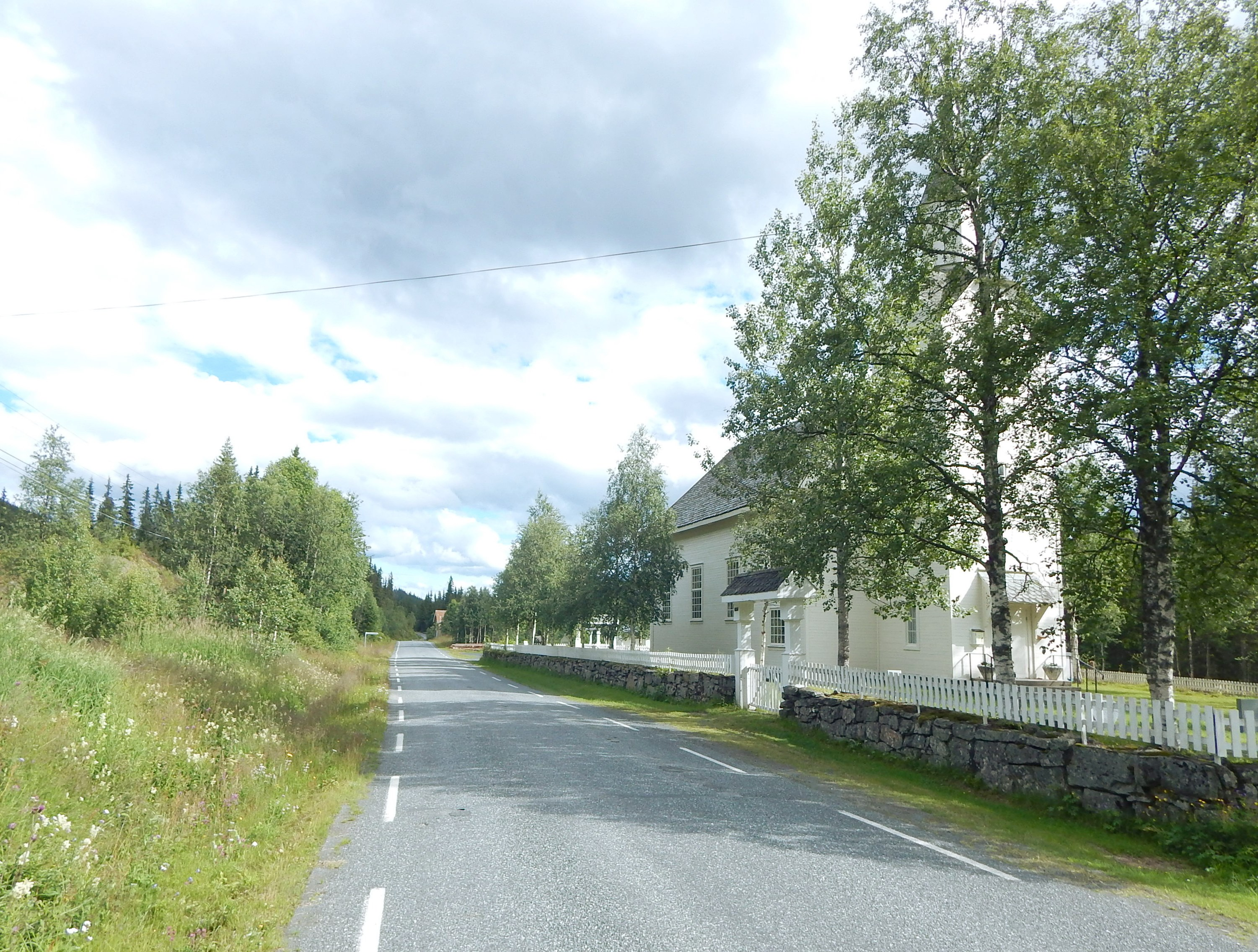 Fylkesvei 2442 (tidl. 204) forbi Nord-Etnedal kirke